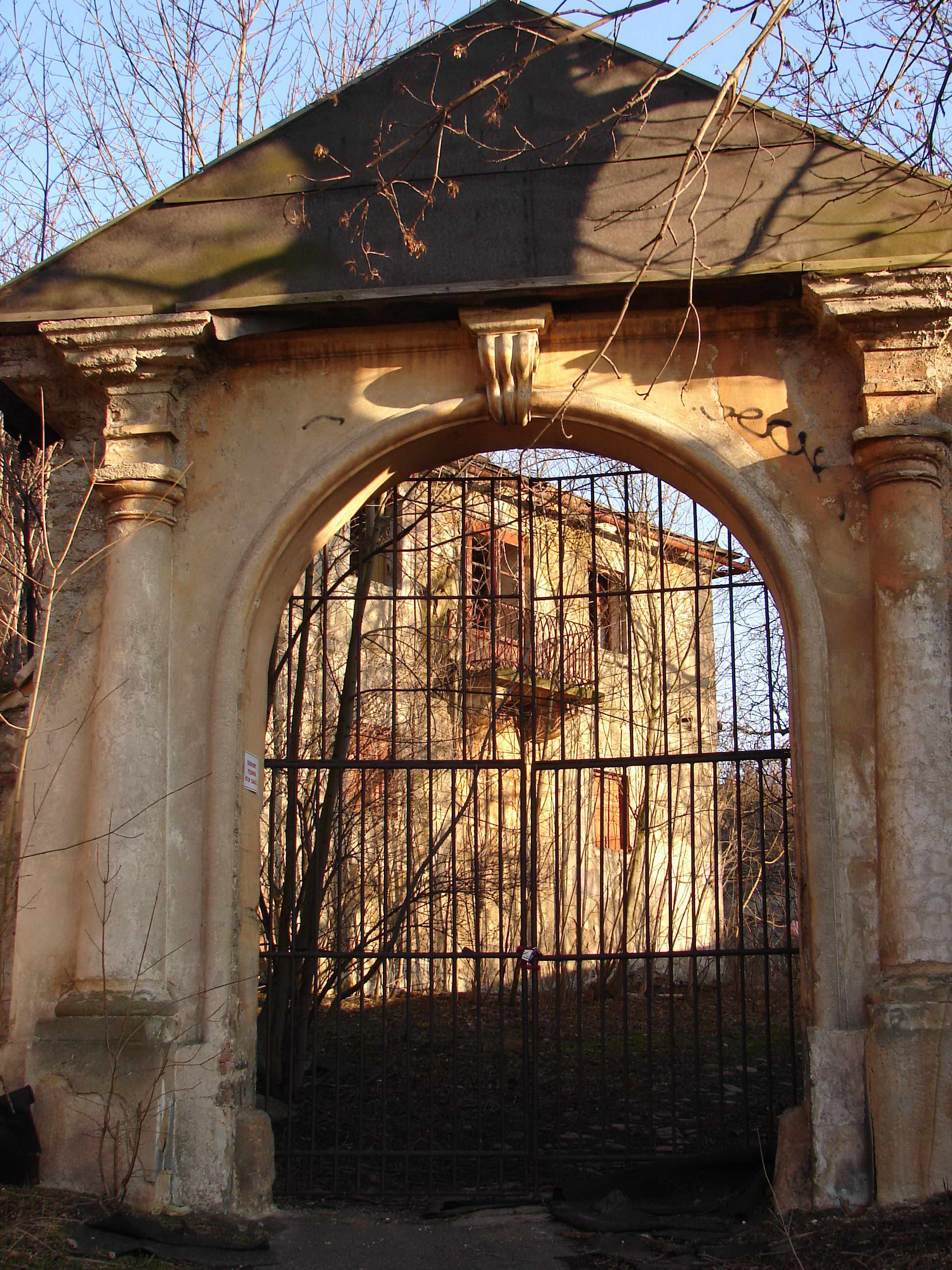 Vjezd do empírového zámečku z anglického parku. Na zakrytém štítu umístěn erb knížete Thuna.